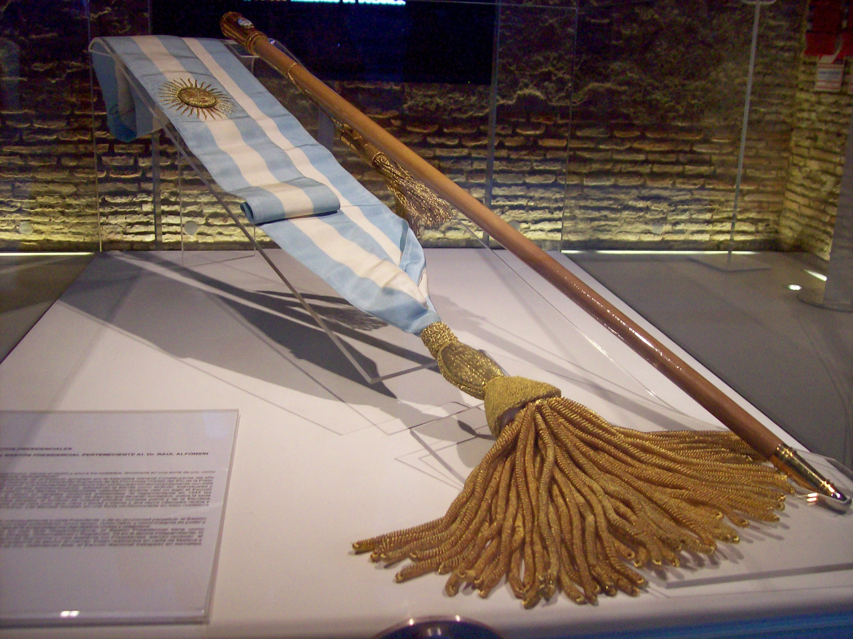 Banda presidencial y bastón de mando (realizado por Juan Carlos Pallarols) de Raúl Alfonsín, exhibidos en el Museo del Bicentenario, Buenos Aires, Argentina.